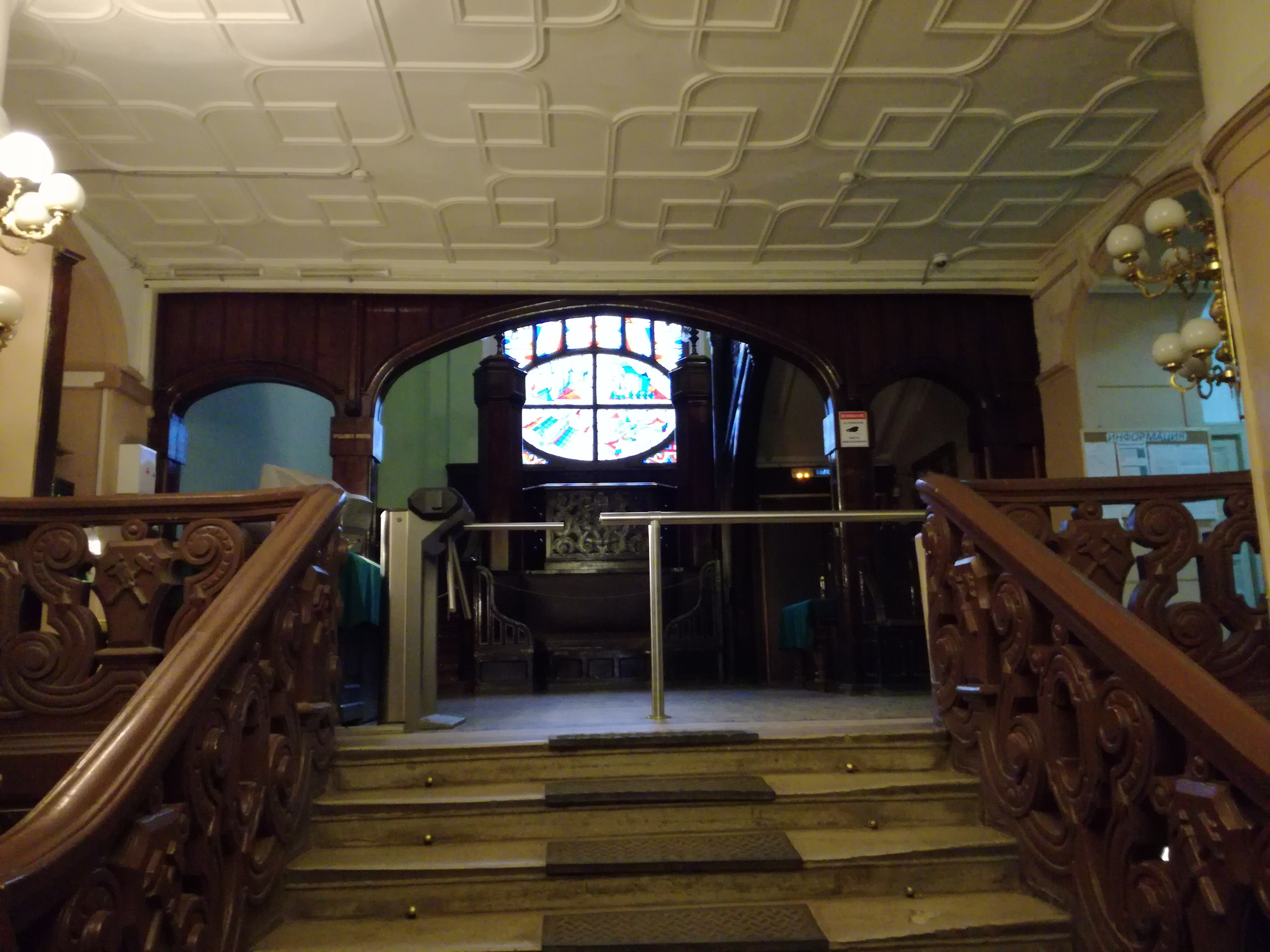 Интерьеры ИМаш